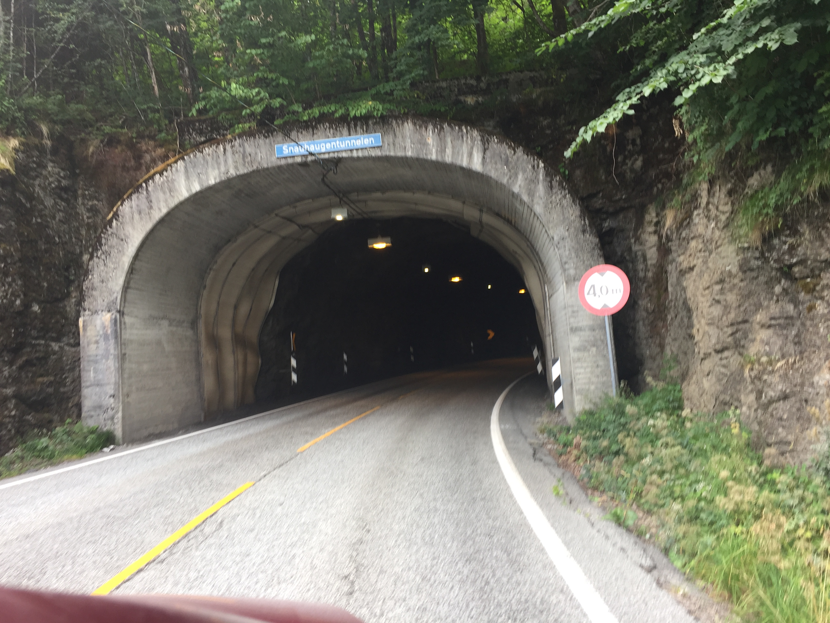 Snauhaugtunnelen